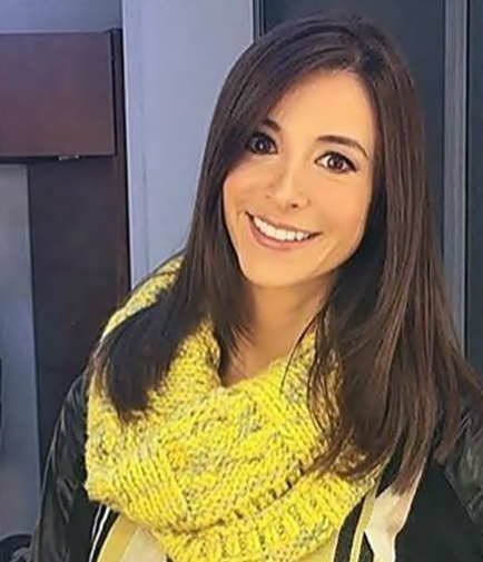 Presentadora y periodista colombiana